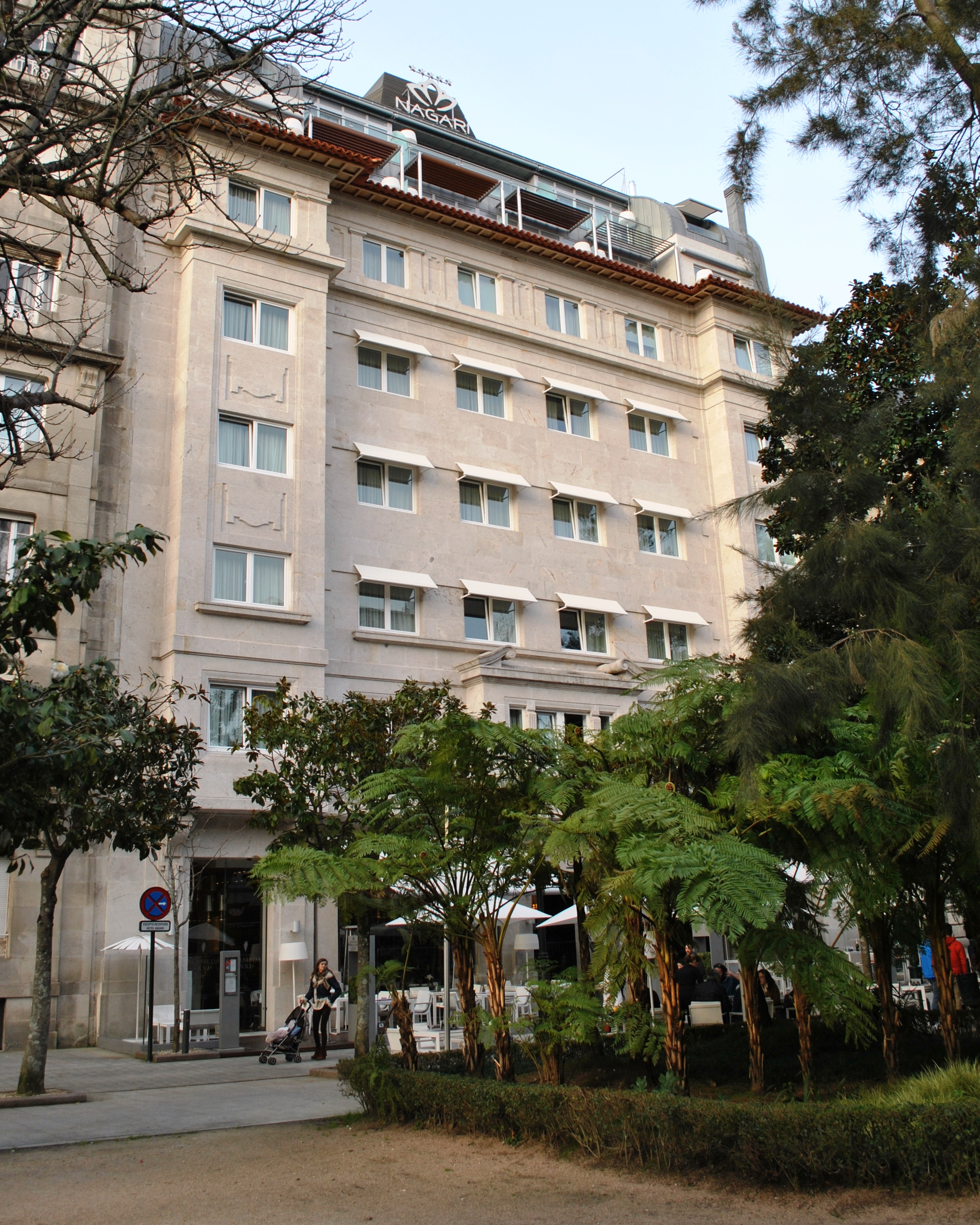 Véxase o título e as categorías